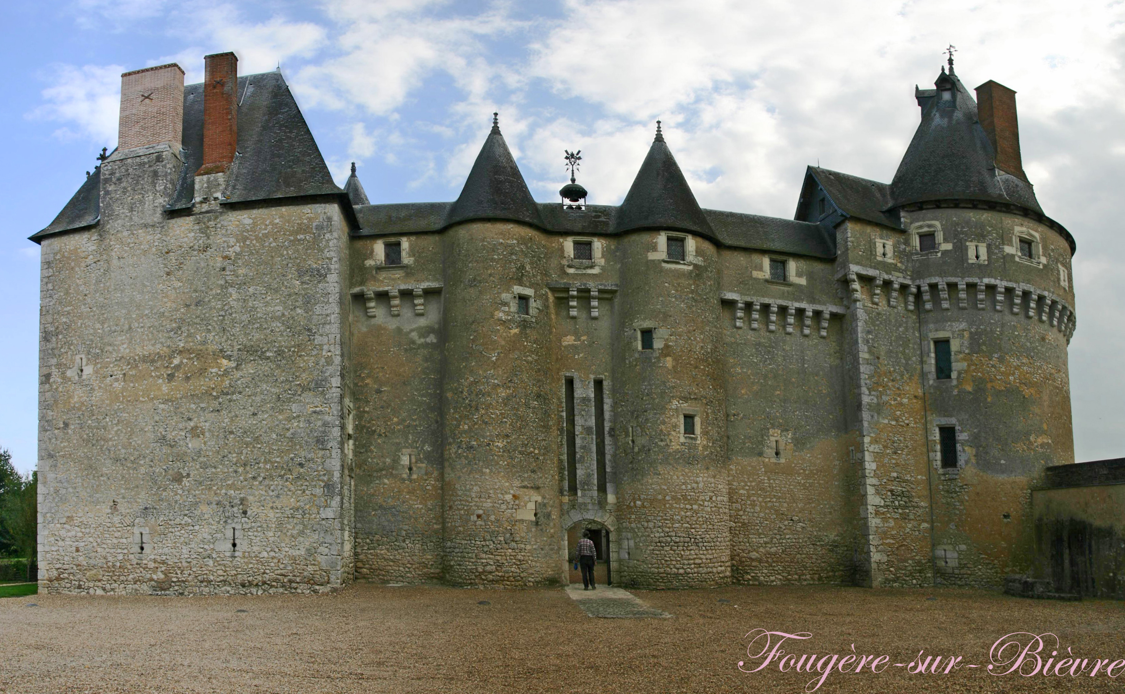 Schloss Fougères-sur-Bièvre